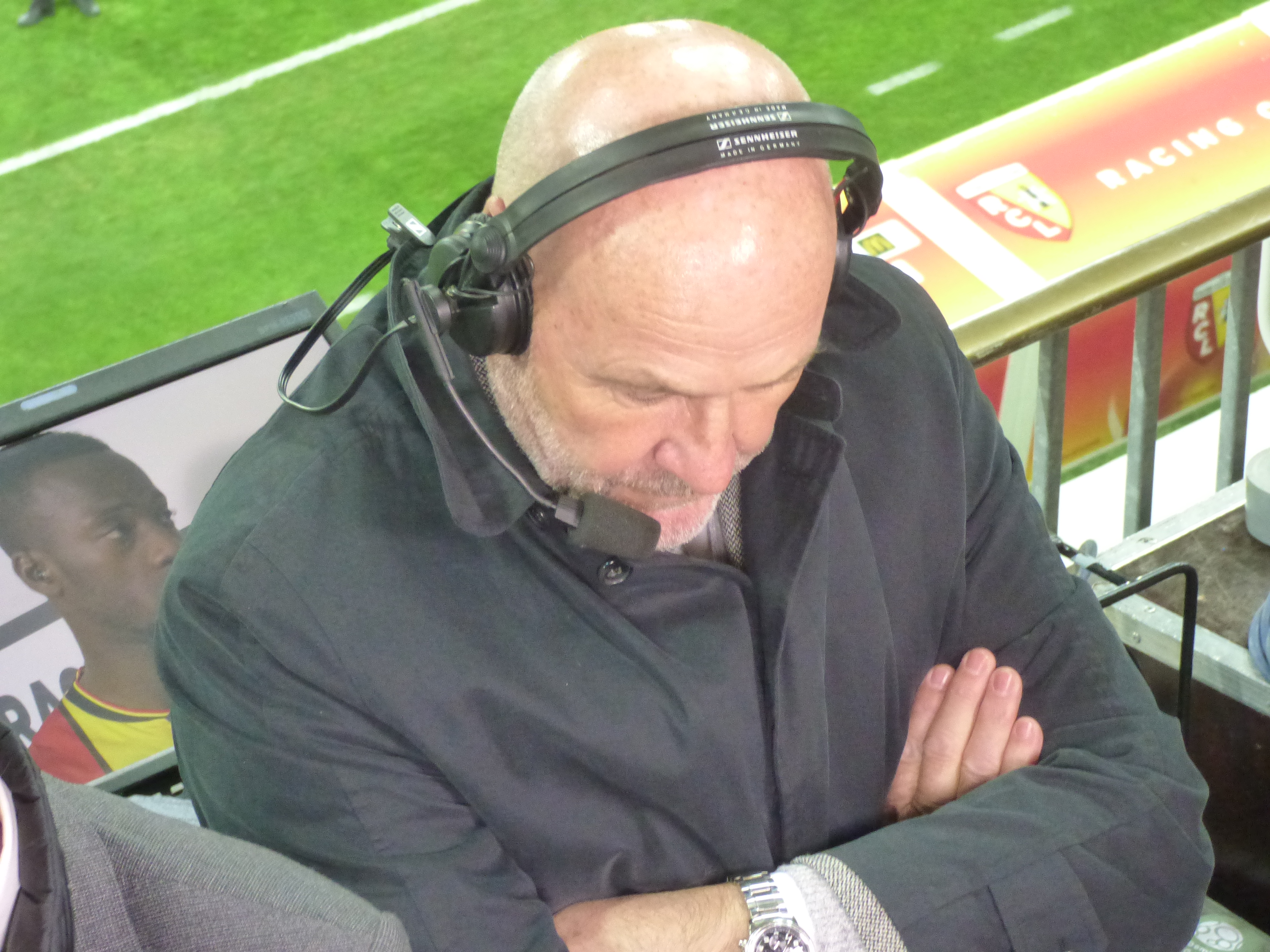 Jean-Luc Arribart pendant le match RC Lens / GFC Ajaccio, comptant pour la onzième journée du championnat de France de Ligue 2 2018-2019 au Stade Bollaert-Delelis, le 22 octobre 2018.